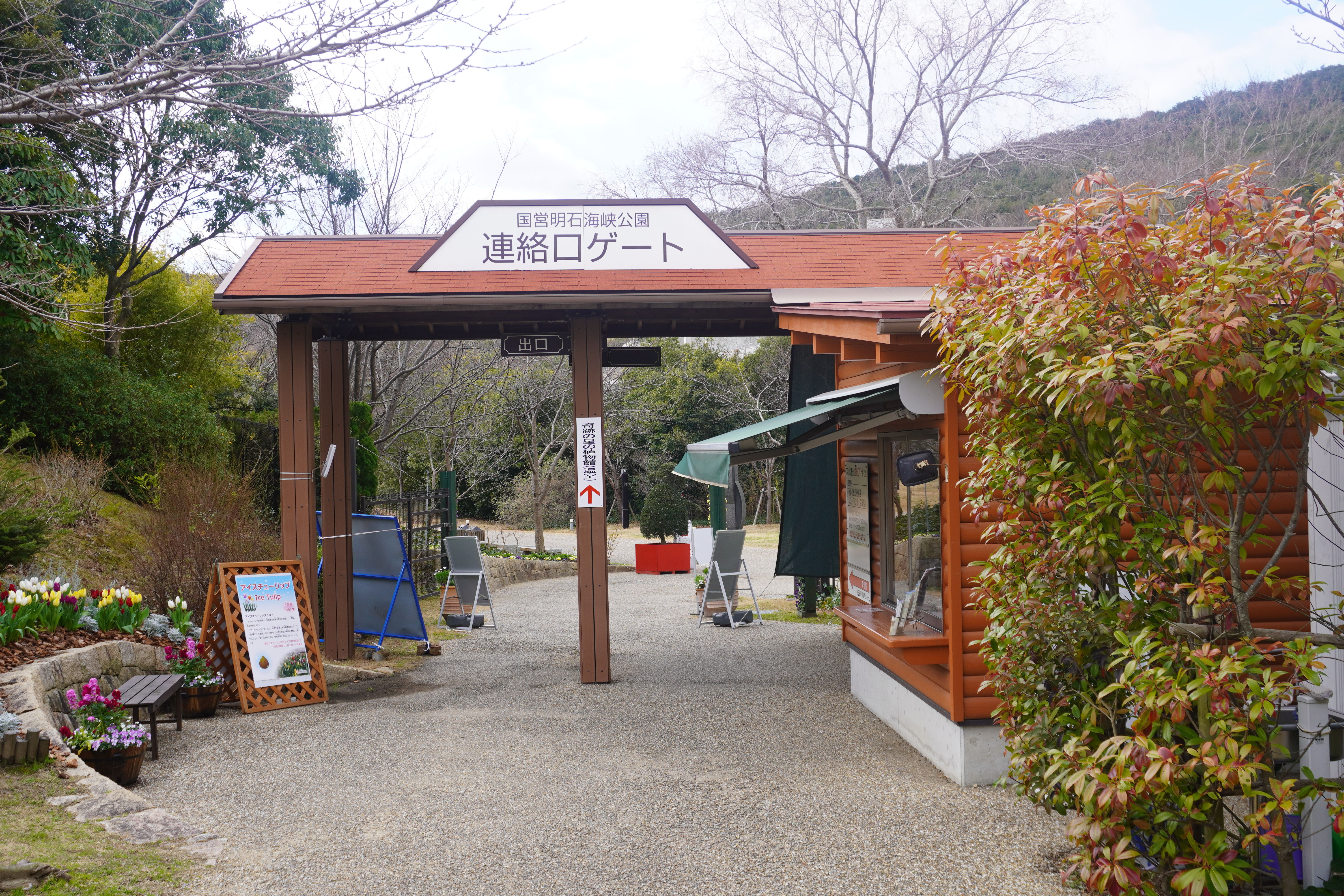 国営明石海峡公園連絡口ゲート